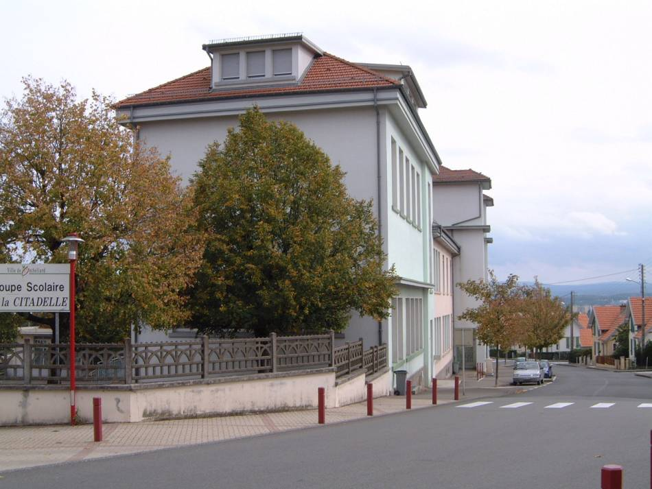 Ecole communale mixte de la Citadelle de Montbéliard (Nerijp:Photo prise par mes soins)